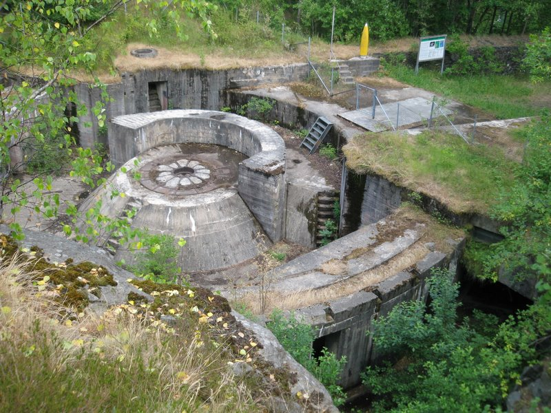 Bilder av restene av Vardås festning på Nøtterøy